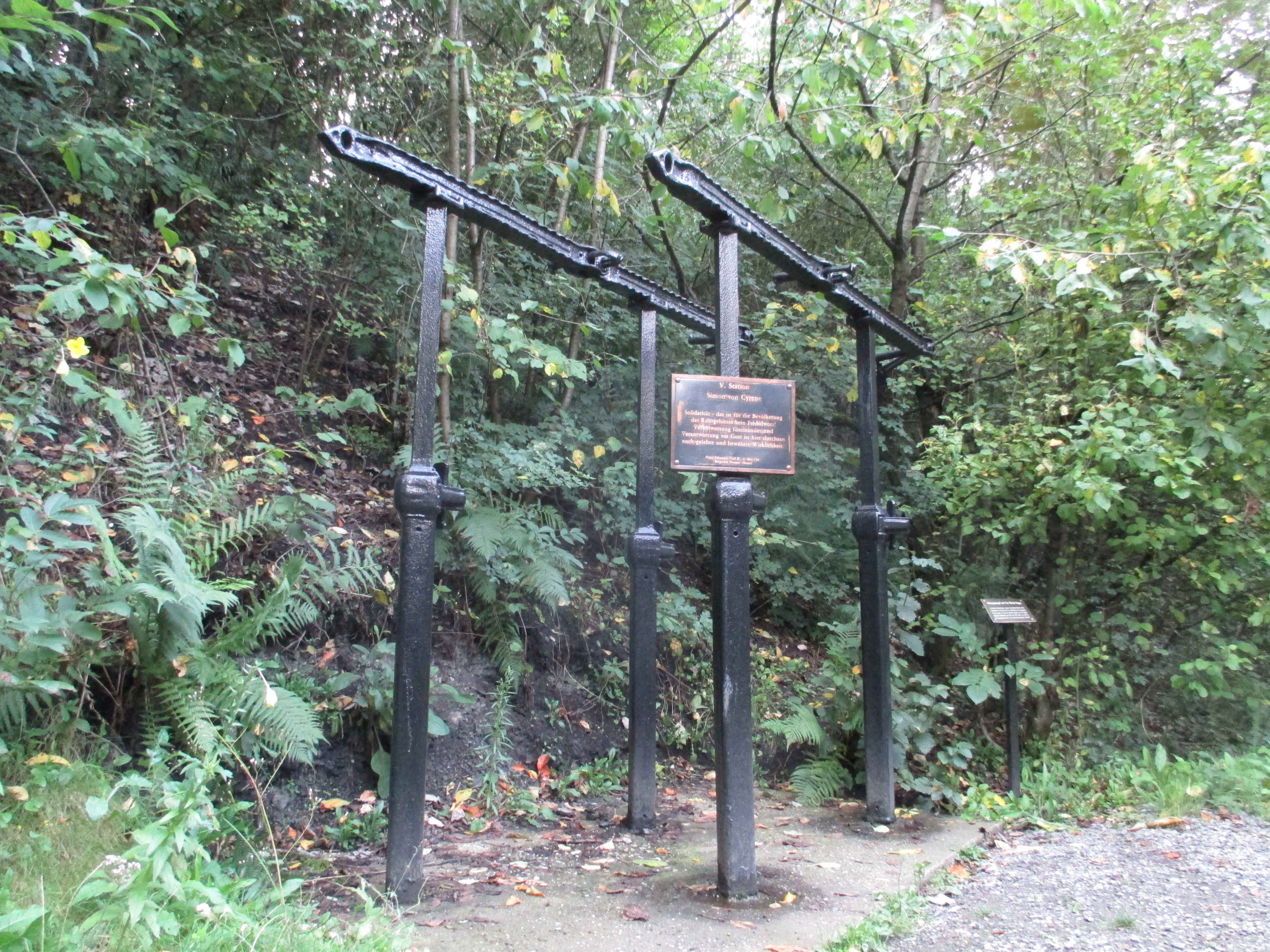 Station 5 des Bergbaukreuzweges an der Halde Haniel in Bottrop. Reibungsstempel mit Van-Wersch-Kappe.